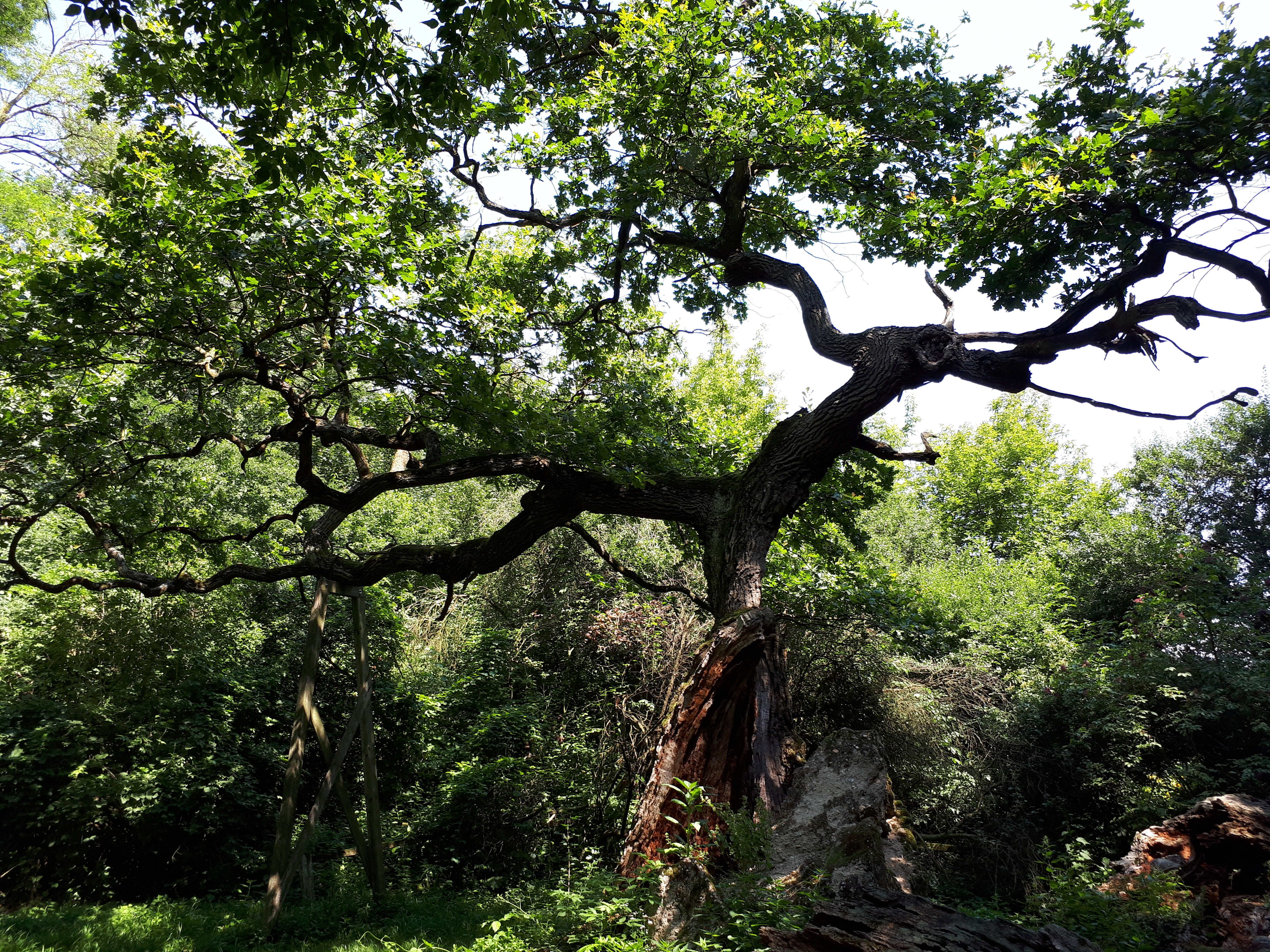 A zsennyei 1000 éves tölgy fényképe, készült 2018/07/10